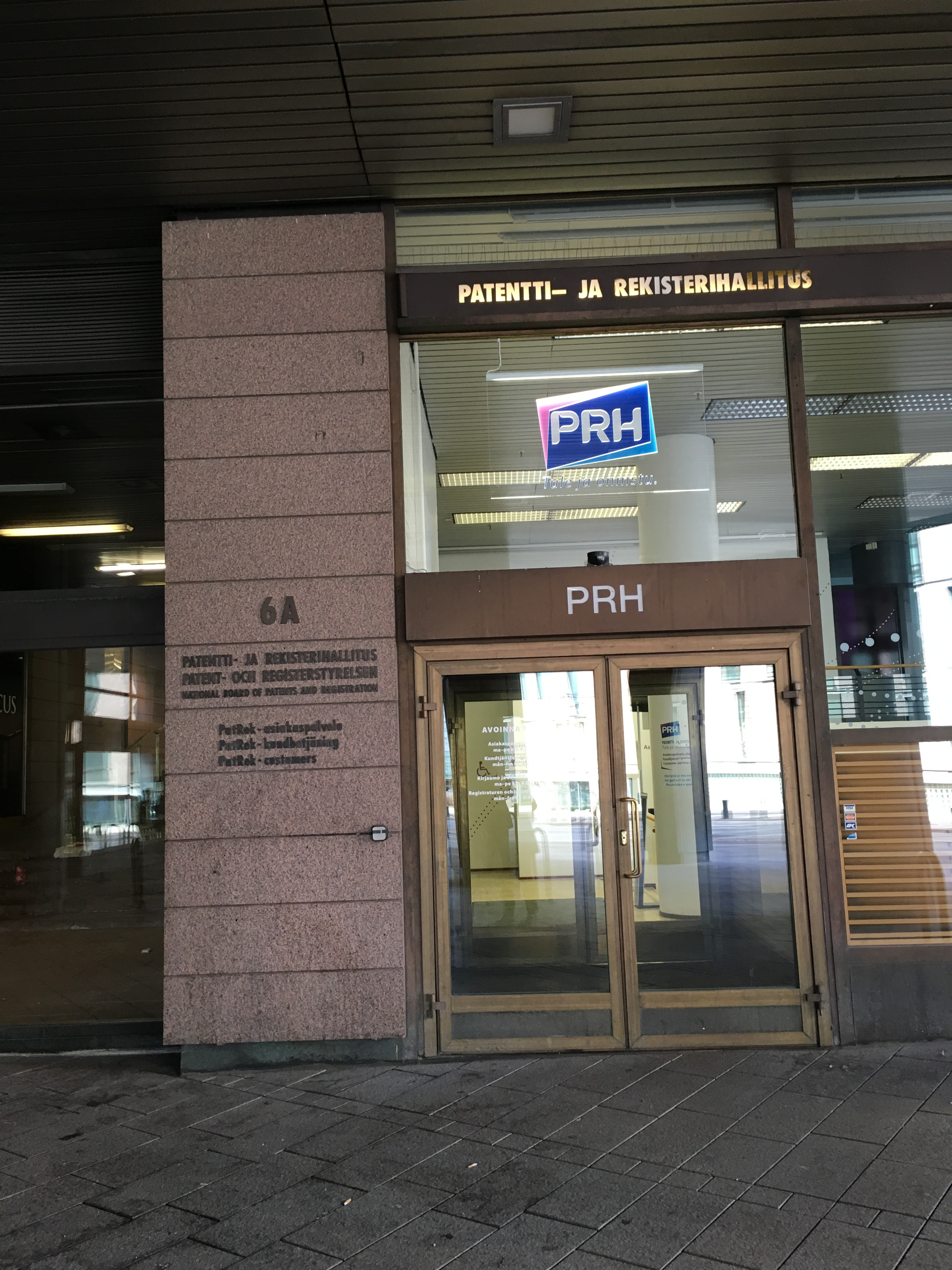 PRH:n sisäänkäynti vanhoissa tiloissa Arkadiankadulla. Nykyinen osoite on Sörnäisten rantatie 13 C, Helsinki.